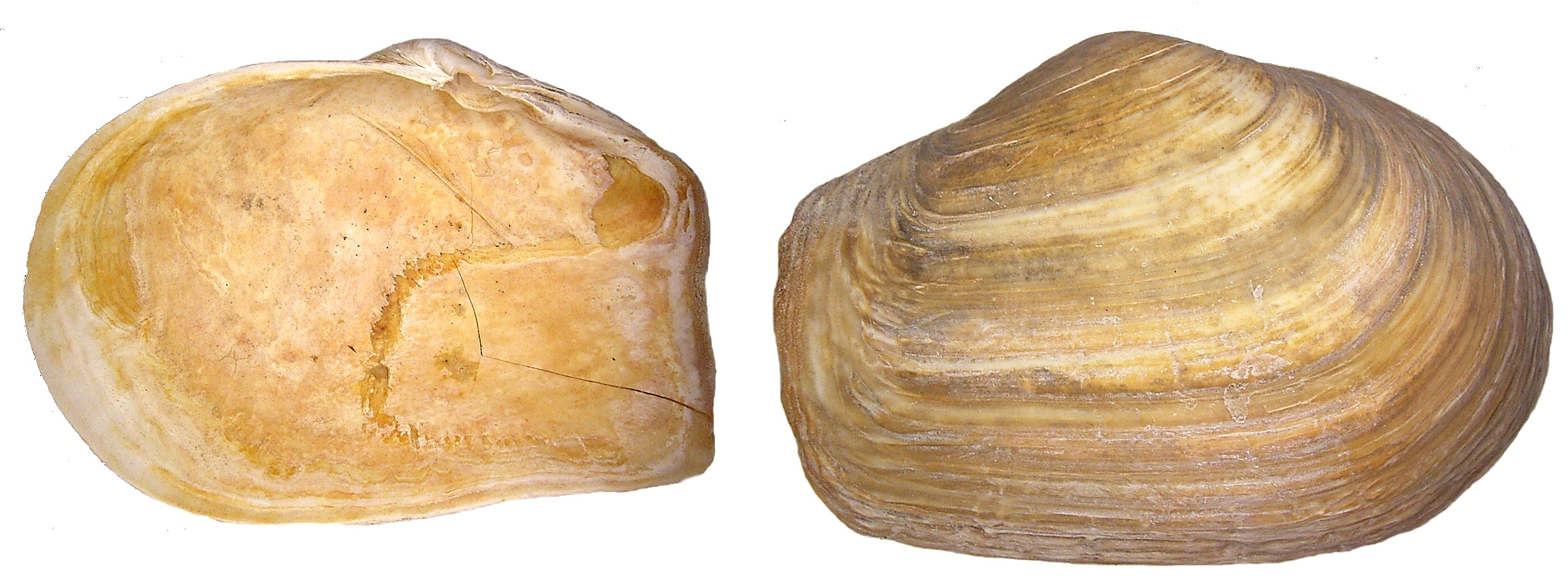 Familie: Myidae Groesse: 40-80 mm Verbreitung: arktisch-zirkumpolar Fundort: Dänemark, Fanö leg.det. U.Schmidt, 1977 Photo: U.Schmidt, 2006